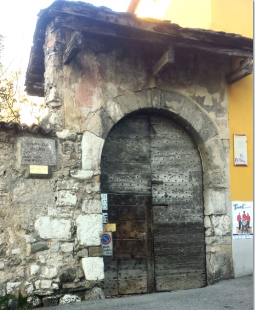 Presunta casa di Lucia